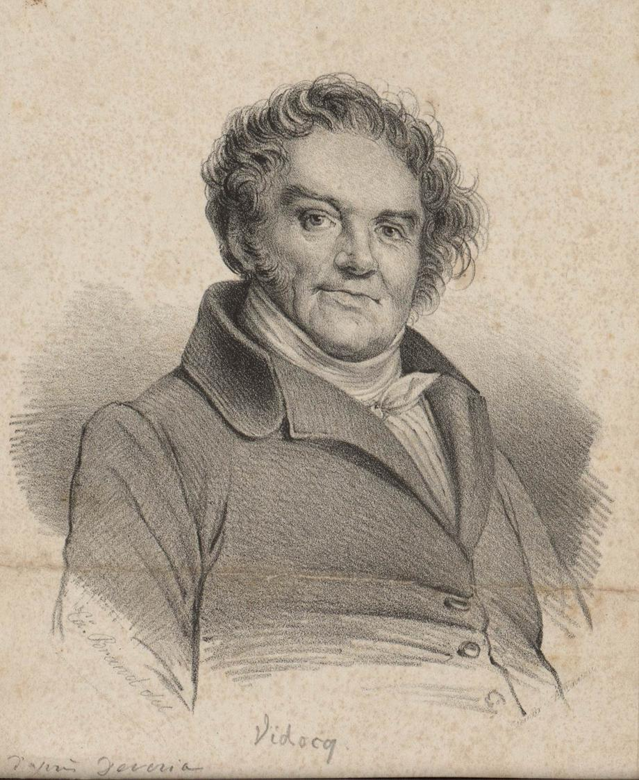 Portrait de Vidocq, d'après Achille Devéria.